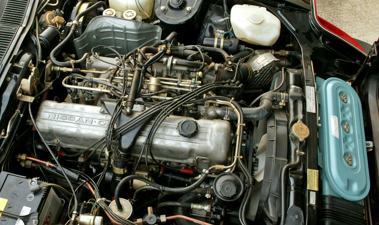 Nissan L28ET Engine in Datsun 280ZX ( US spec )